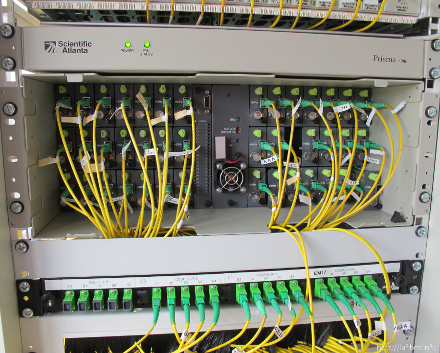 Convetisseur fibre-coaxial et coupleurs fibre optique CityPlay Amiens